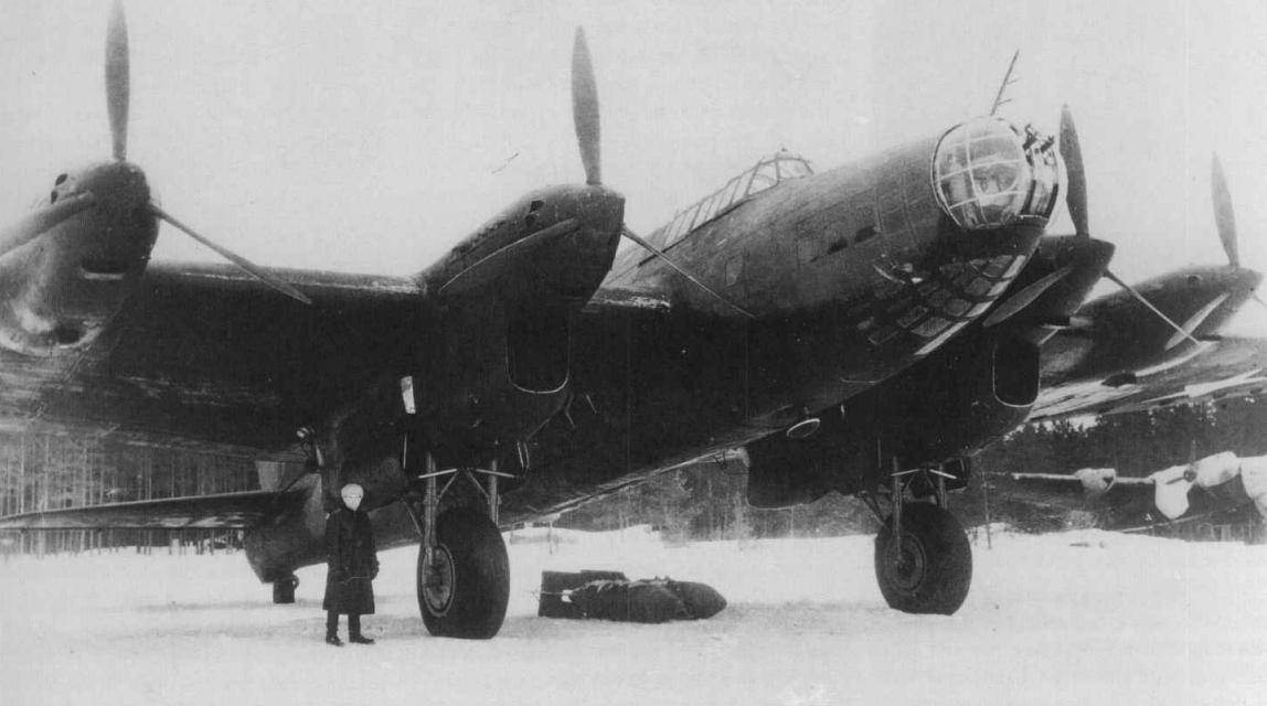 Pe-8 mit AM-35A in Kratowo im Winter